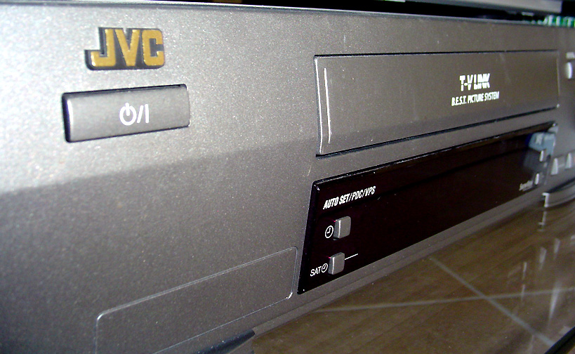 JVC (electronicabedrijf) VHS-systeem